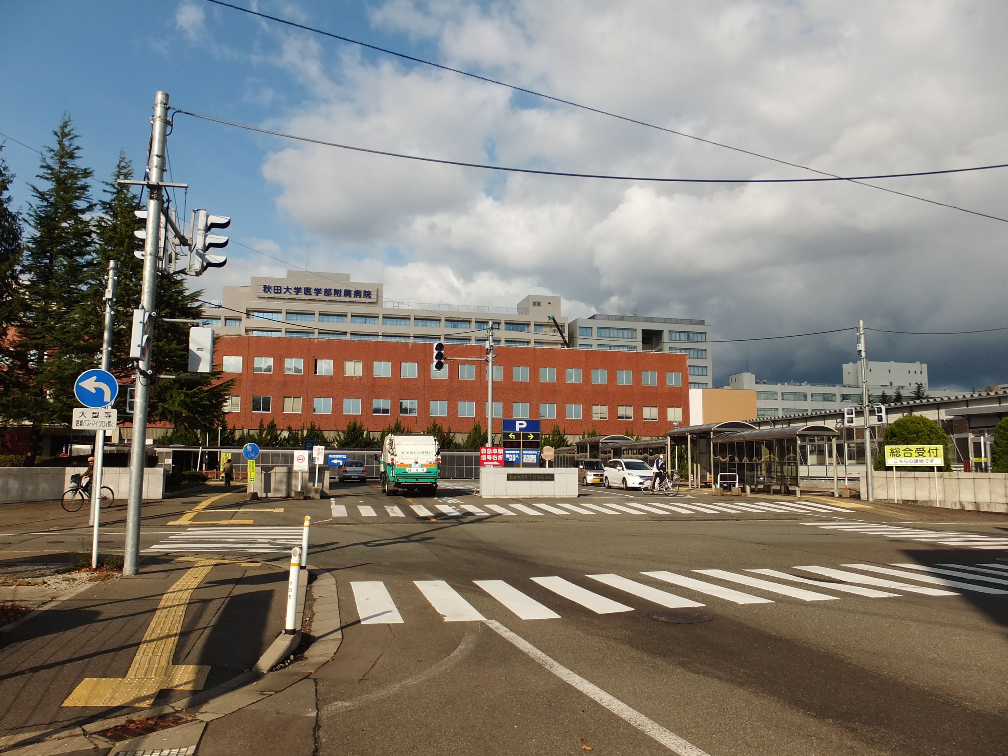 秋田大学医学部附属病院（秋田市広面）